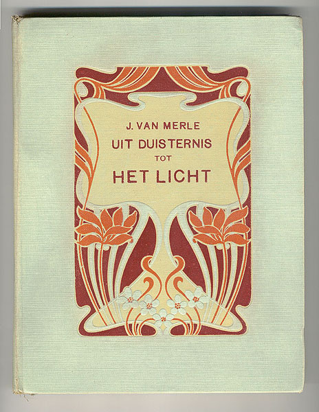 Boekomslag: Uit duisternis tot het licht. Zonder druk +/- 1905. Auteur: J. van Merle. Bandontwerp: A. Sipkema. Uitgeverij: G. Mosmans